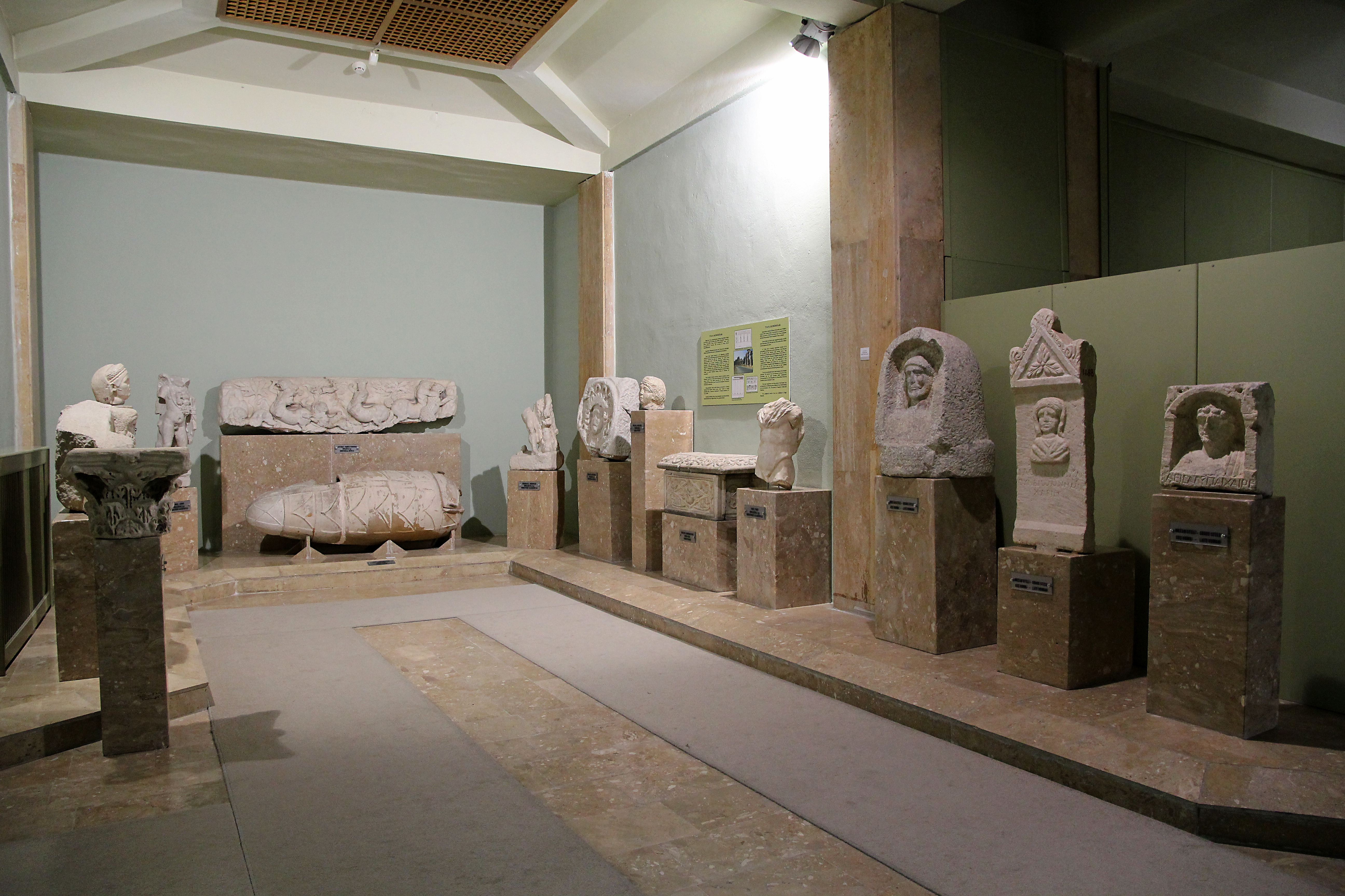 Archäologisches Museum Niğde, Türkei, Funde aus Tyana/Kemerhisar